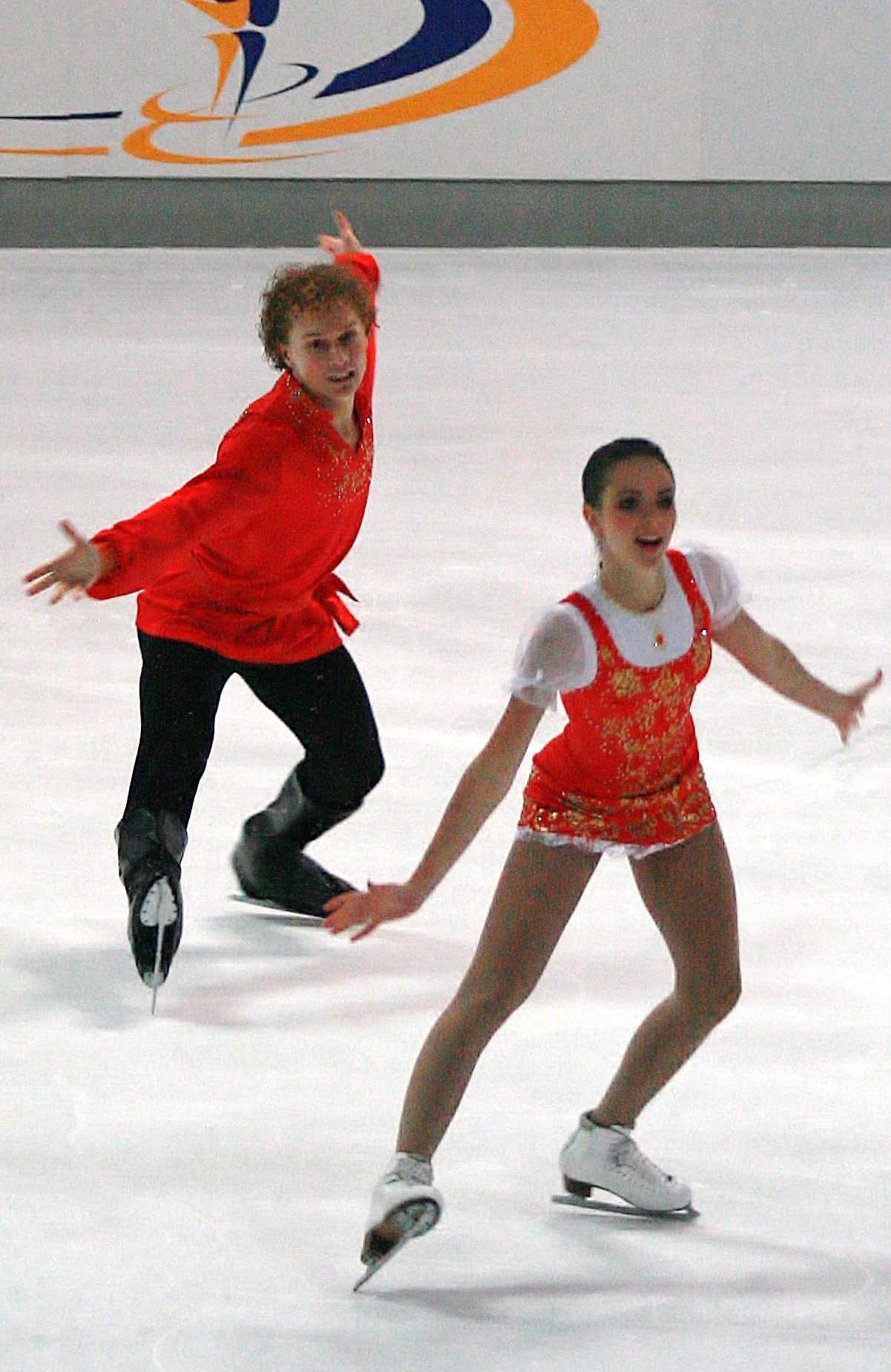 Наталья Забияко и Александр Забоев (Эстония) на 2013 Nebelhorn Trophy